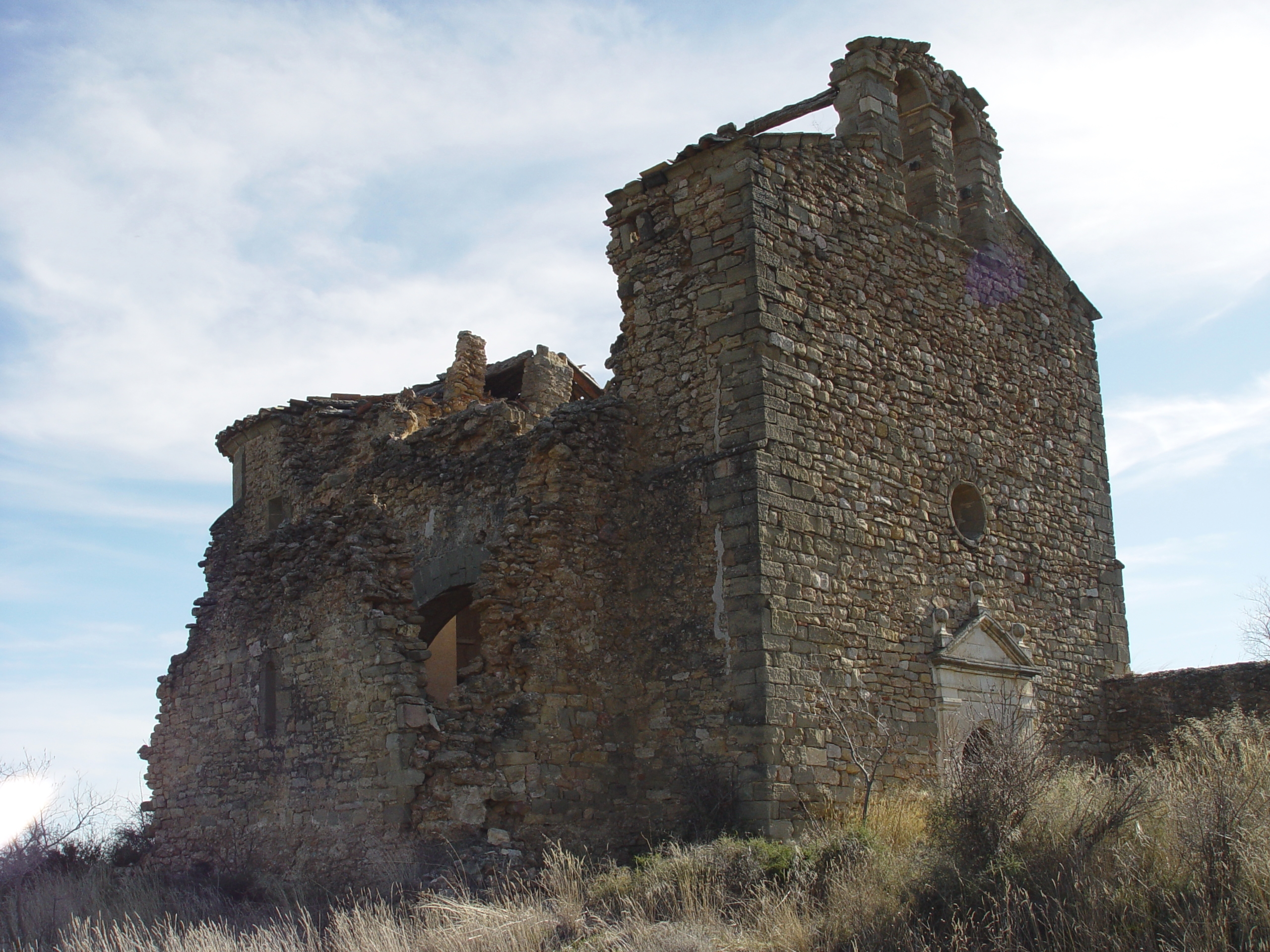 Església de Sant Miquel de Fet